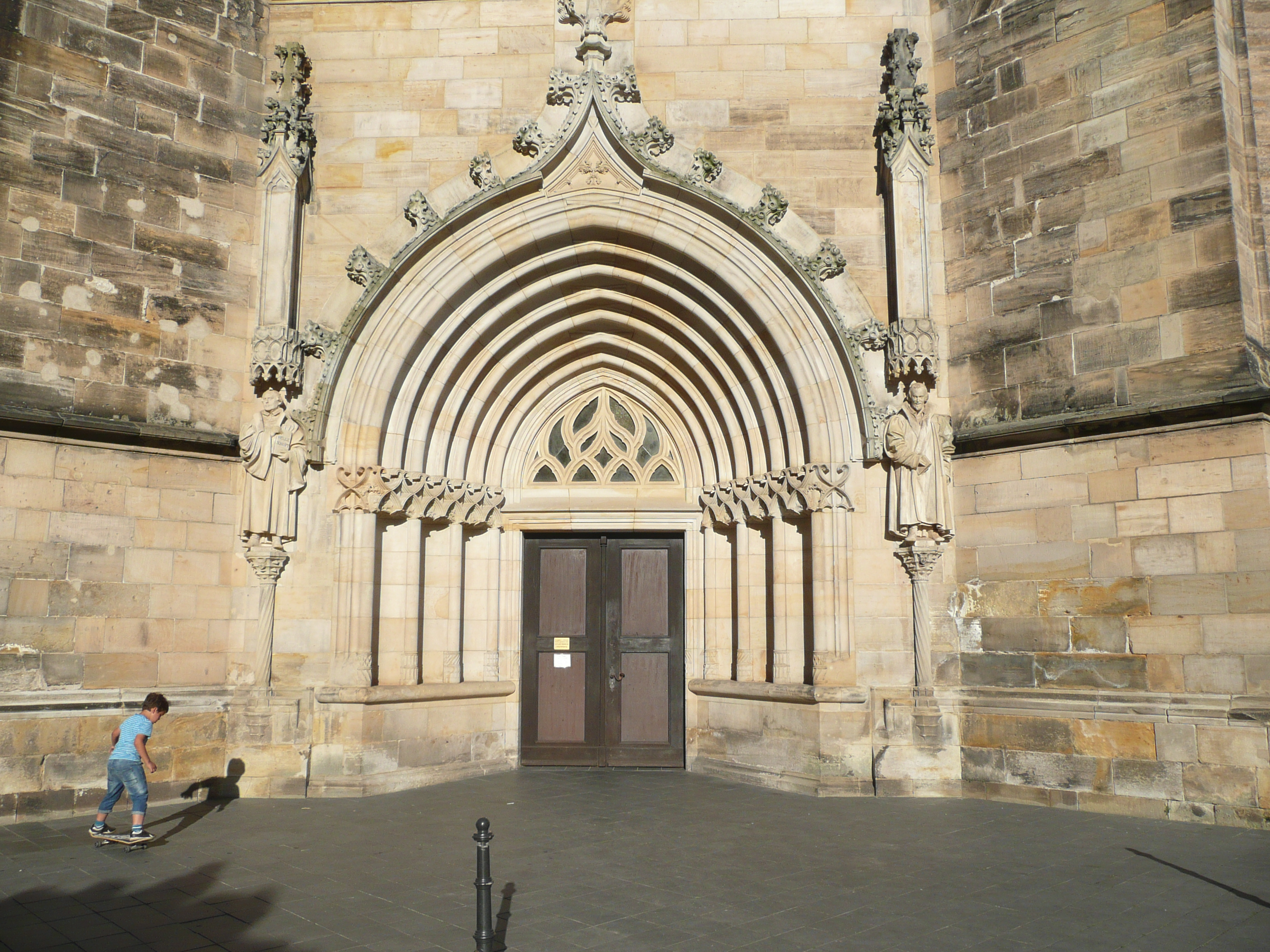 Spätgotisches Stufenportal im Turmuntergeschoss. Die Baldachinfiguren links und rechts stellen Martin Luther und Phillip Melanchton dar. (vgl. Georg Dehio: Handbuch der Deutschen Kunstdenkmäler. Thüringen. Bearbeitet von Stepahnie Eißing, Frank Jäger u. a., München, Berlin 1998